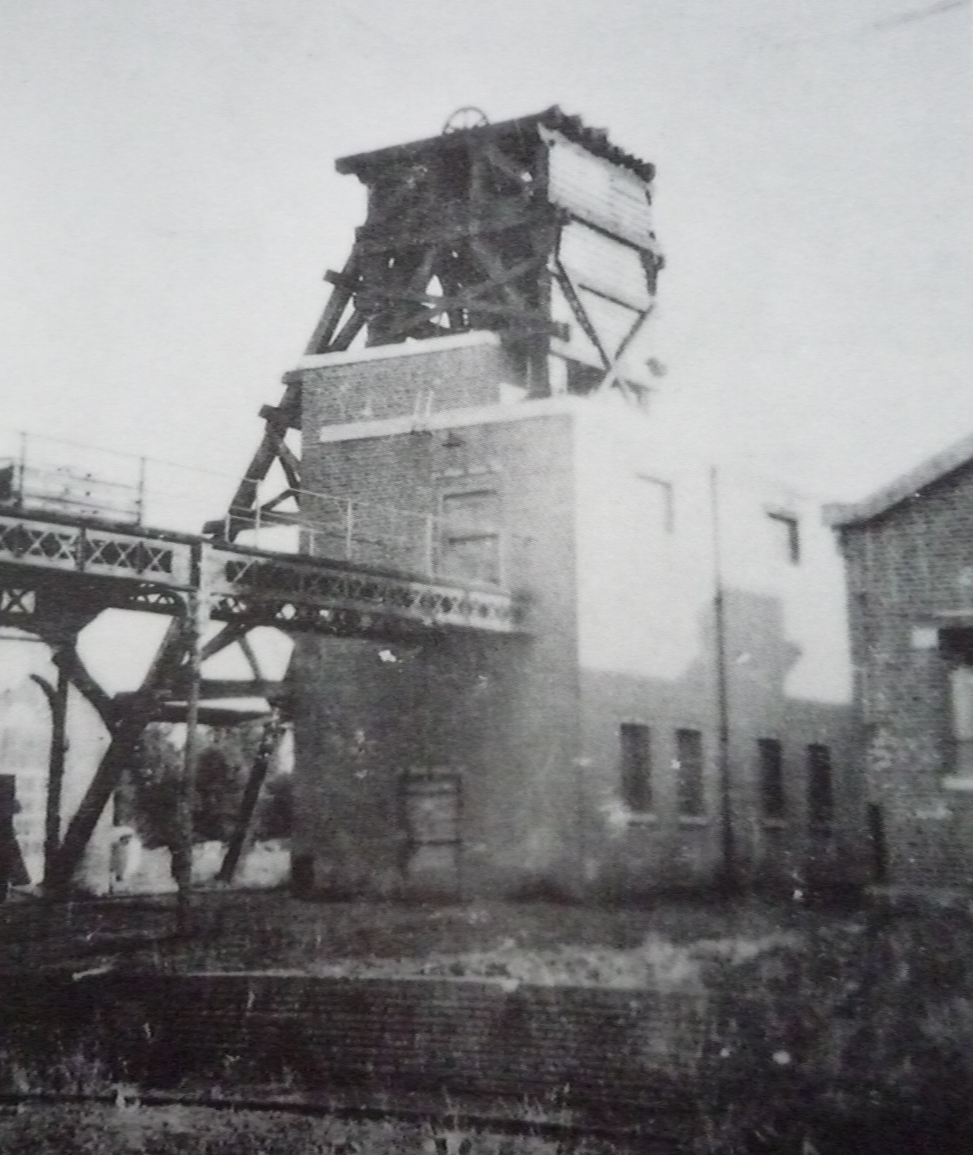 La Fosse n° 2 de la Compagnie des mines d'Auchy-au-Bois, devenue la Fosse n° 3 de la Compagnie des mines de Ligny-lès-Aire était un charbonnage constitué d'un seul puits situé à Auchy-au-Bois, Pas-de-Calais, Nord-Pas-de-Calais, France.